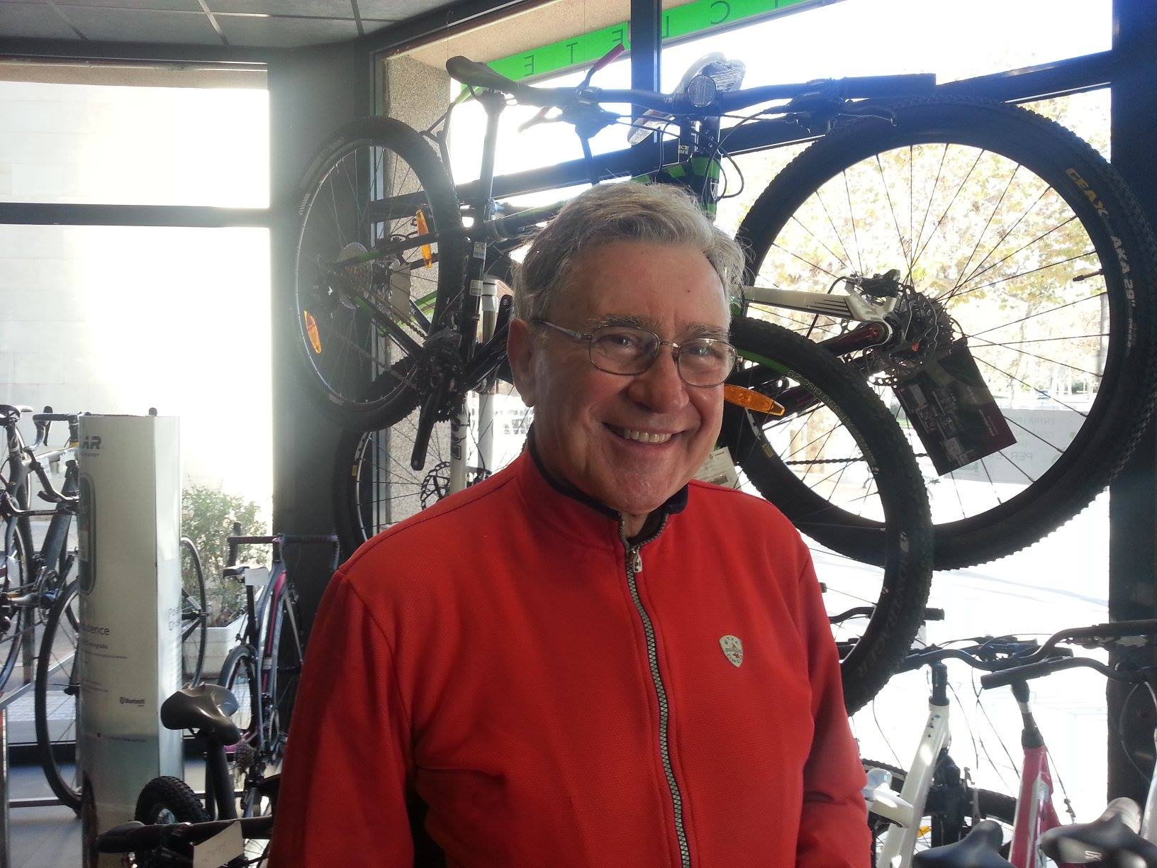 Jordi Mariné i Tarés